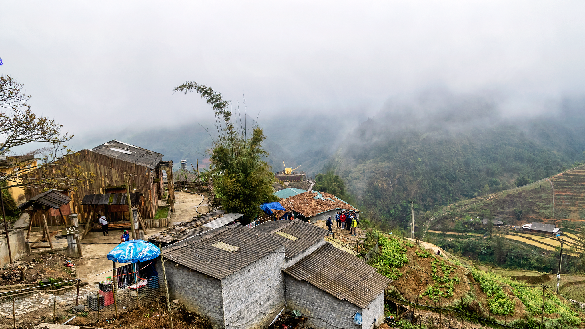 Bản Cát Cát là một làng dân tộc Mông được hình thành từ giữa thế kỷ 19, cách thị trấn Sa Pa (thuộc tỉnh Lào Cai, Việt Nam) khoảng 2 km. Người dân nơi đây hiền lành, hiếu khách; biết trồng trọt, chăn nuôi, và dệt vải…